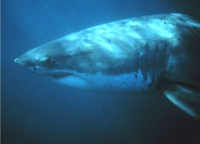 Weißer Hai